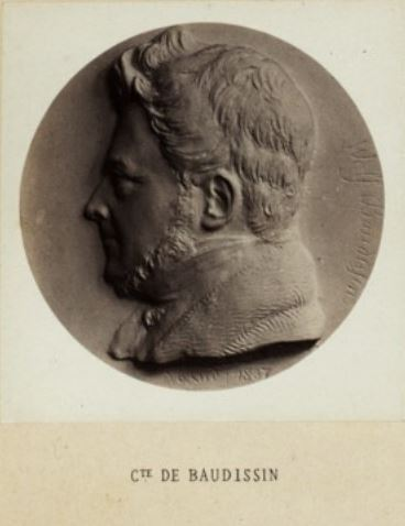 Wolf Heinrich Friedrich Karl von Baudissin (1789-1878), diplomate et écrivain allemand, médaillon (1837) par David d'Angers publié dans Les médaillons de David d'Angers réunis et publiés par son fils David d'Angers, Robert (1833-1912) en 1867.